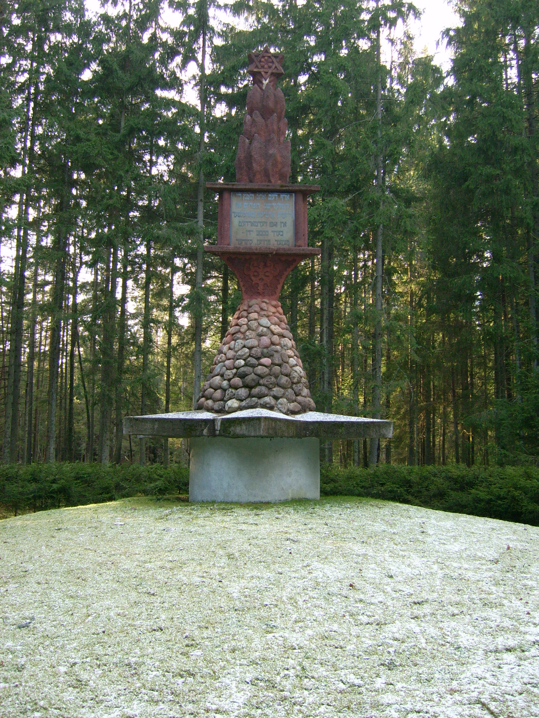 Antšunijų žydų genocido paminklas